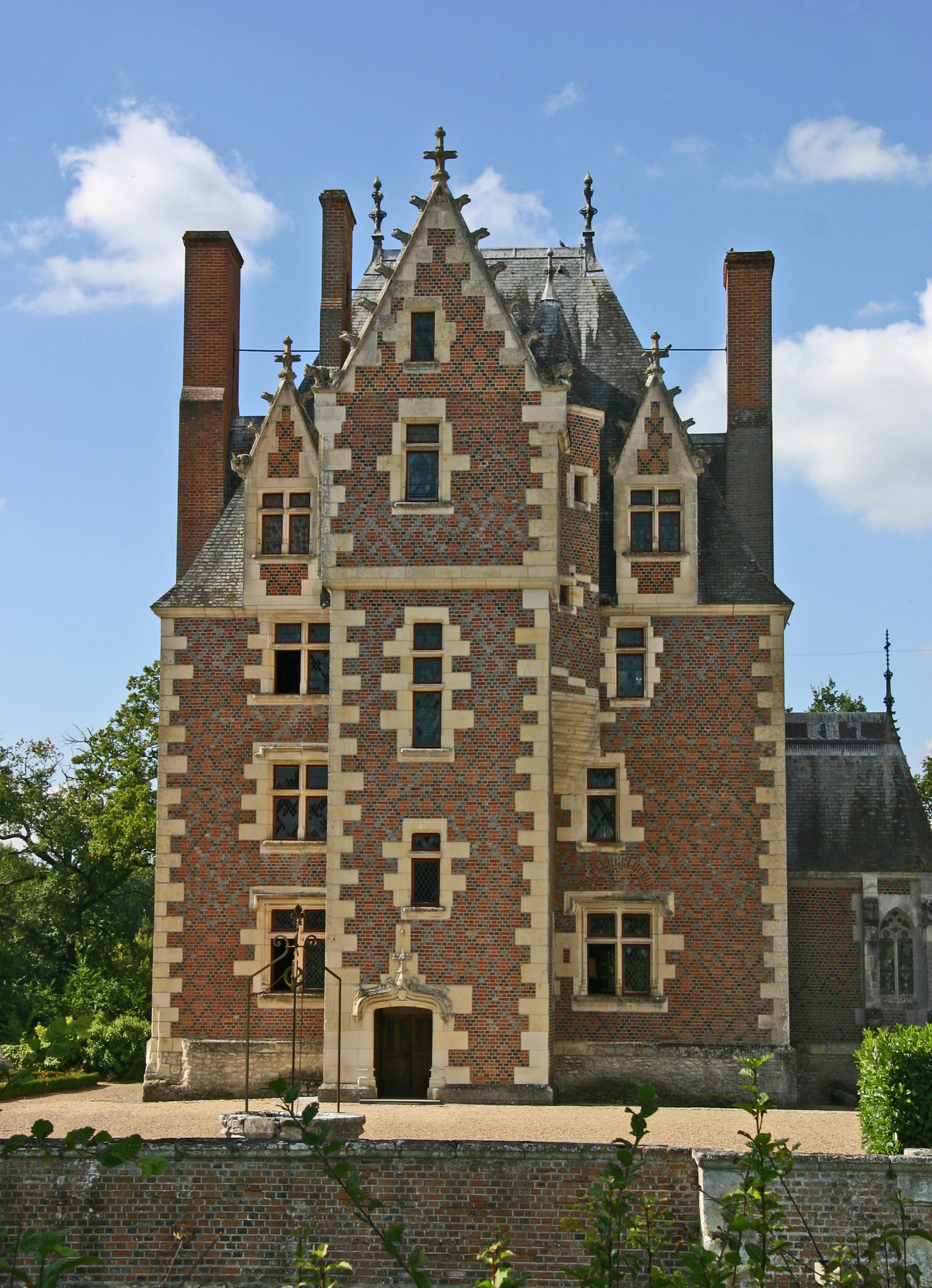 Schloss Le Moulin